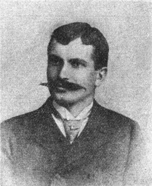 Österreichischer Politiker, Reichsratswahl 1907, Name siehe Dateiname